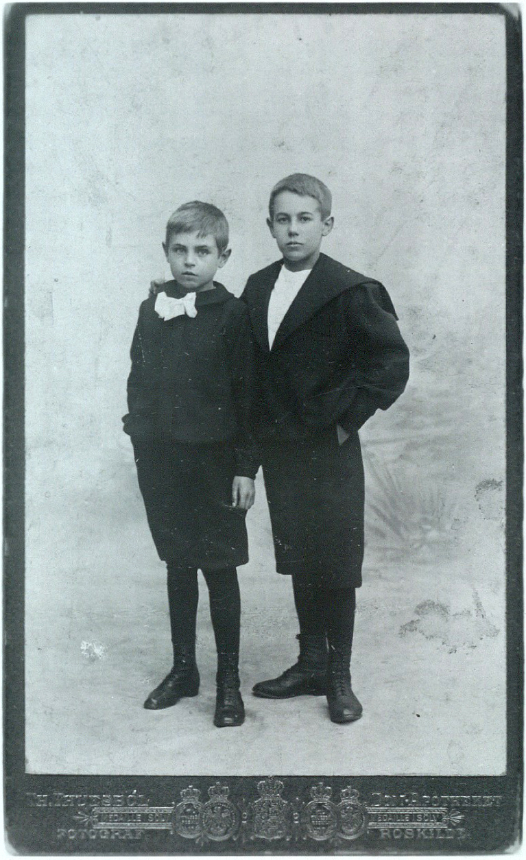 Henningsen, Poul (1894-1967) arkitekt, kritiker, forfatter; Henningsen, Tage (f. ca. 1892) skibsingeniør